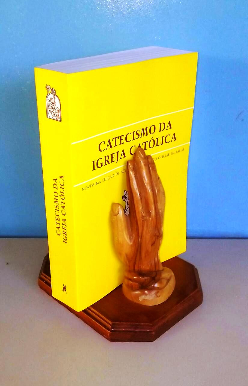 Escultura de Suporte de livro em forma de mão com o Catecismo da Igreja Católica.